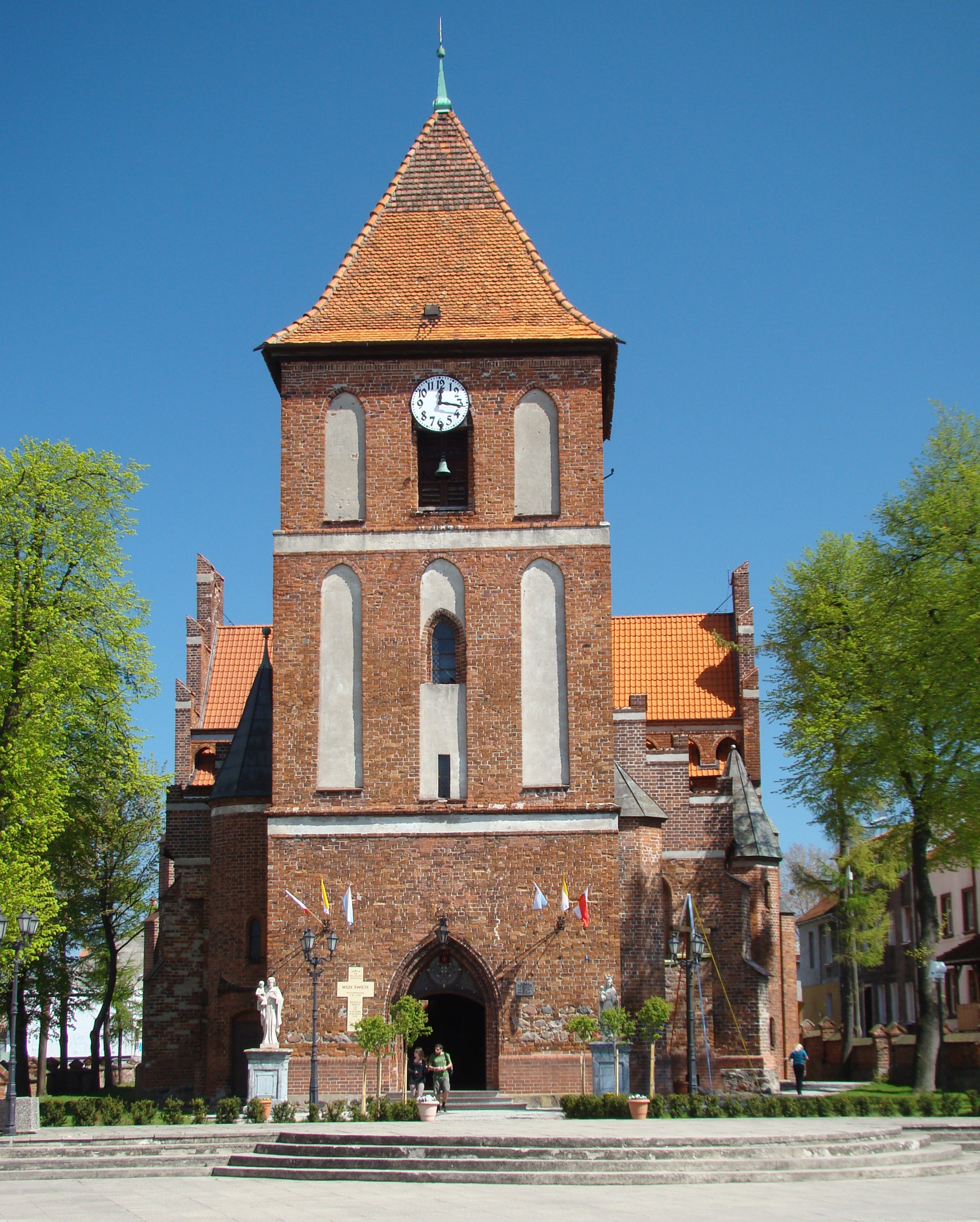 kościół parafialny p.w.św.Jakuba Apostoła